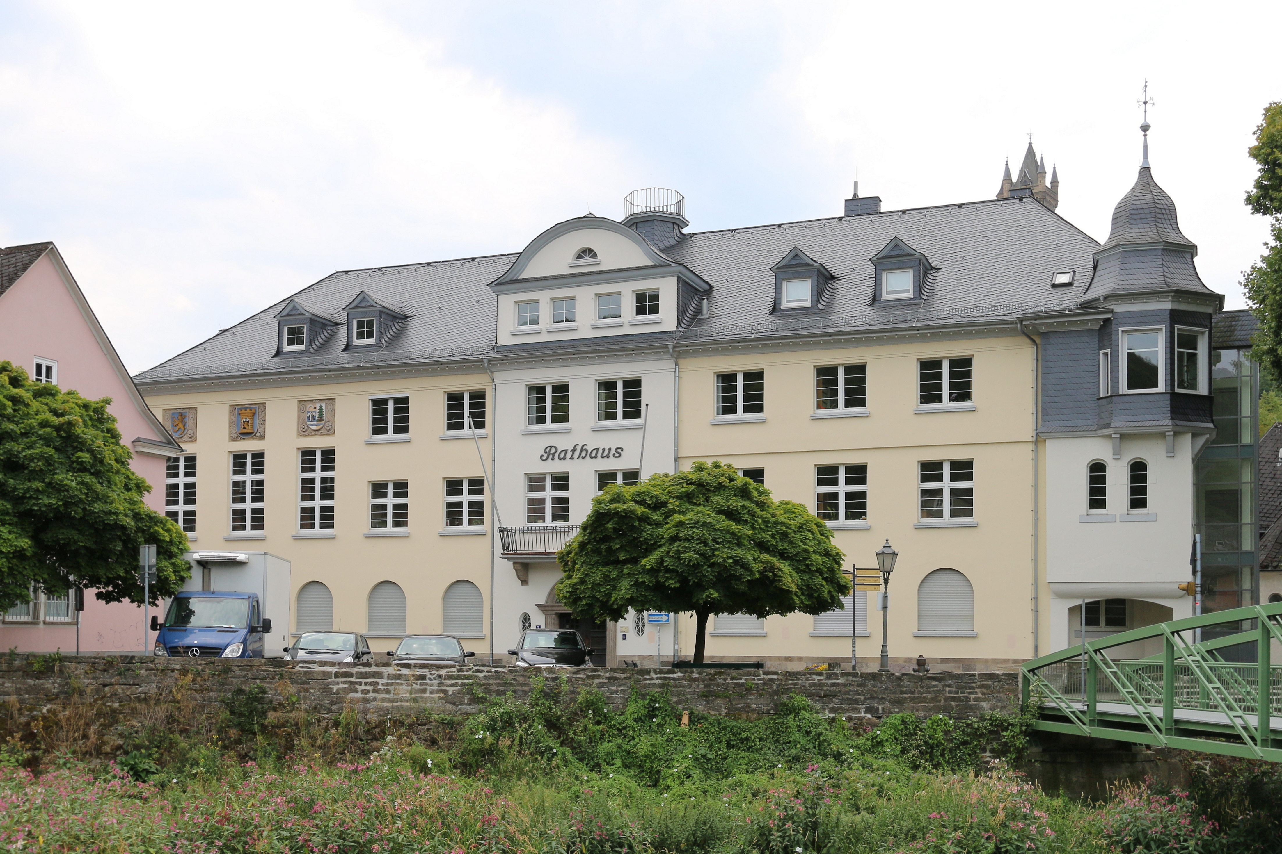 Dillenburg, Lahn-Dill-Kreis: Hauptgebäude der Stadtverwaltung